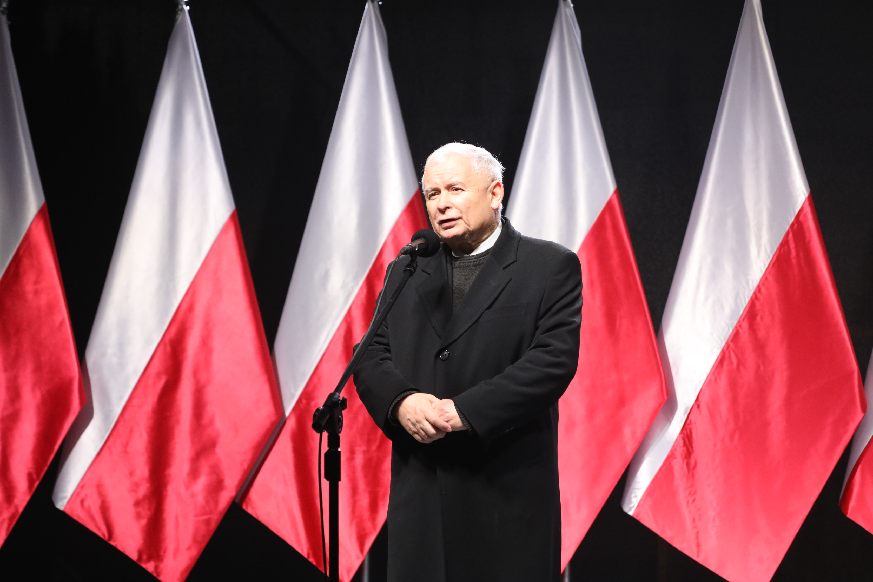 Jarosław Kaczyński przemawia podczas odsłonięcia pomnika Lecha Kaczyńskiego, Prezydenta Polski, 10.11.2018 w Warszawie. Fot. Rafal Zambrzycki